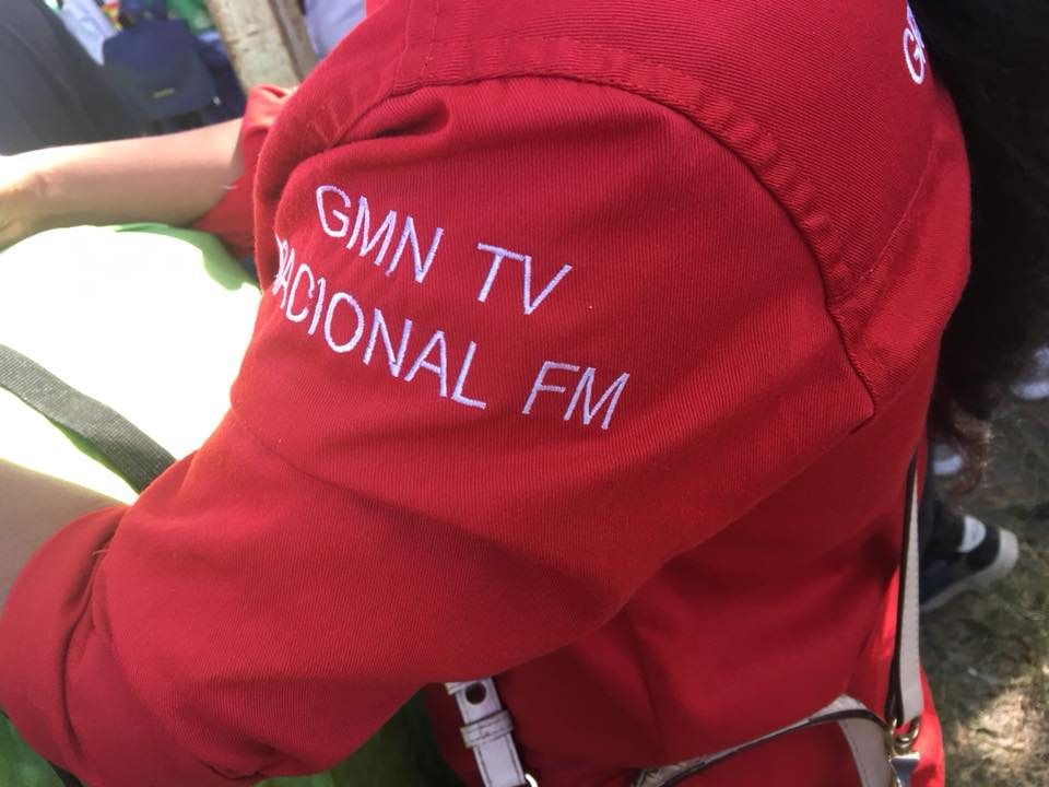 Reporter von GMN TV bei einer Wahlkampfveranstaltung der FDD in Tasitolu